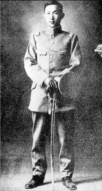 蔡锷